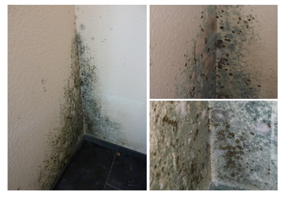 Beschimmelde muur als gevolg van te weinig lucht